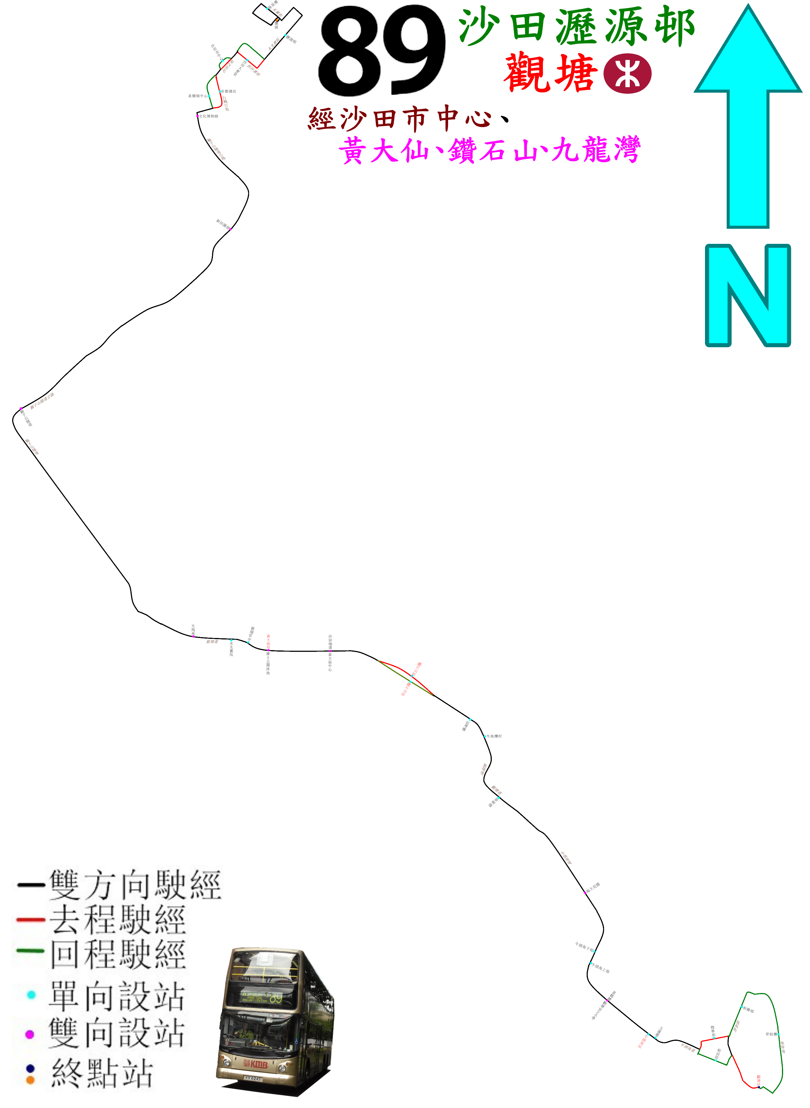 中文（香港）: 九巴89線的走線圖